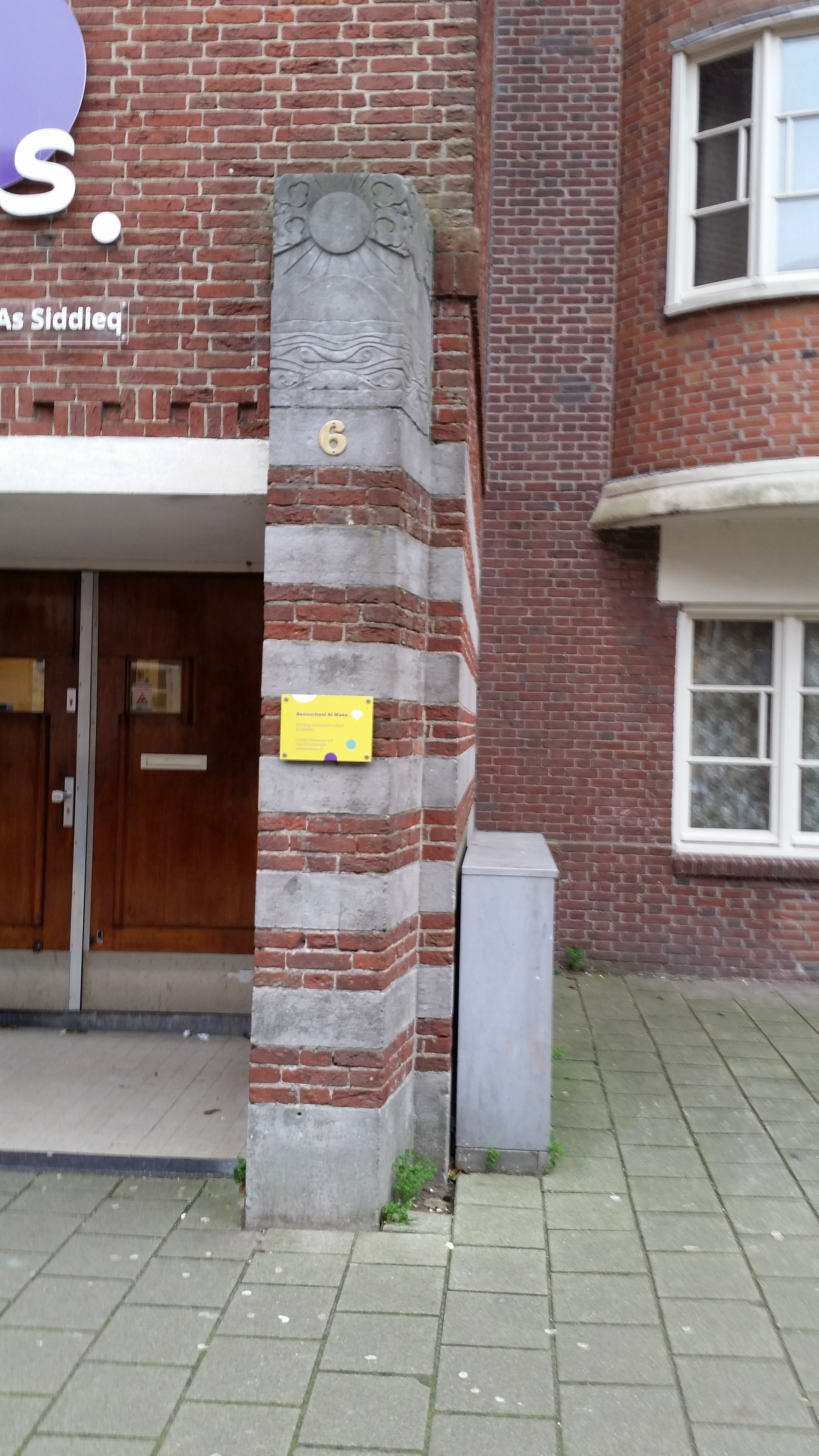 Toegang van de dubbele school van Karel Petrus Tholens met reliëf van Kees Smout